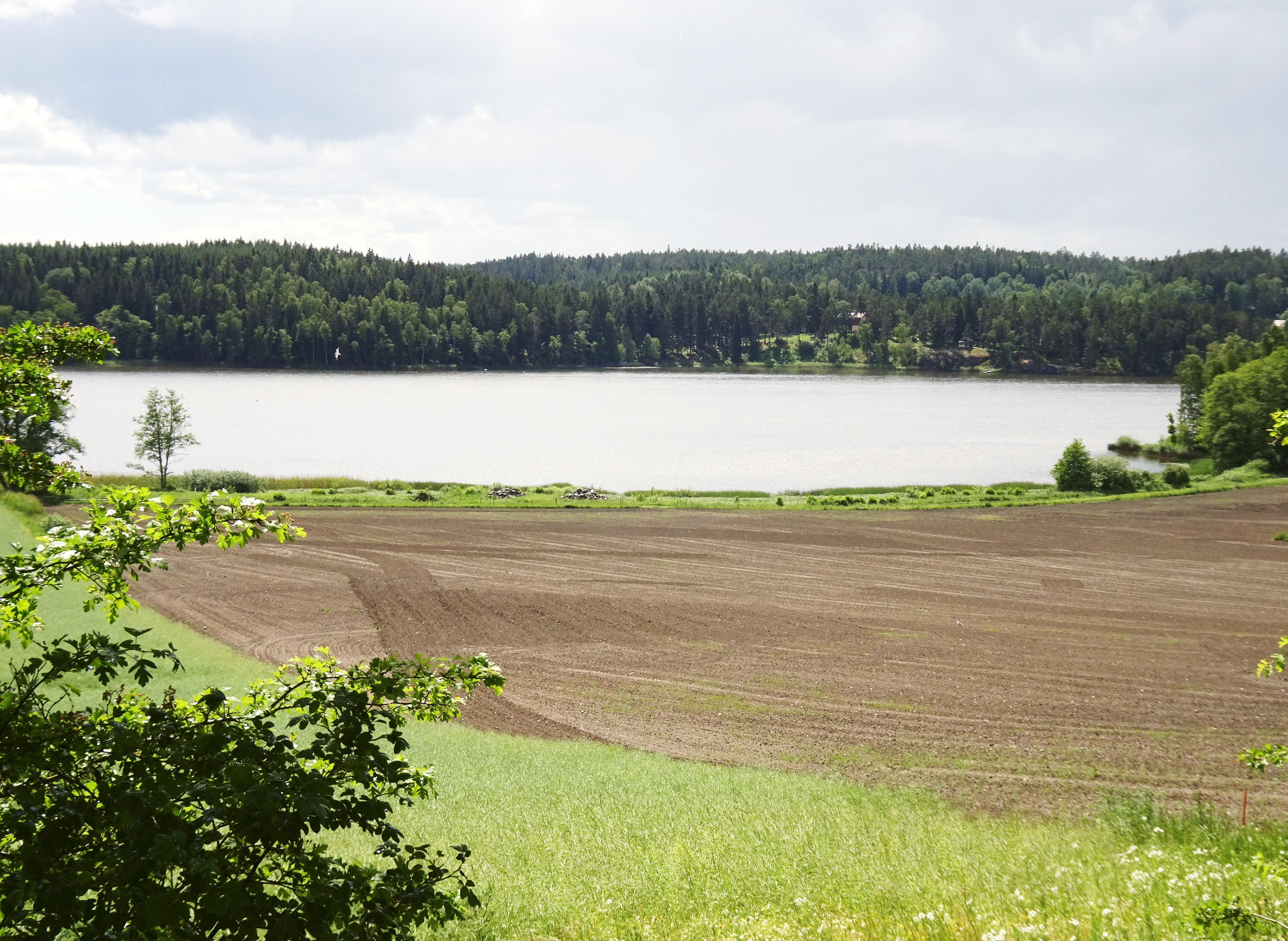 Sjön Lanaren Södertäje kommun, vy mot söder från Kvedesta